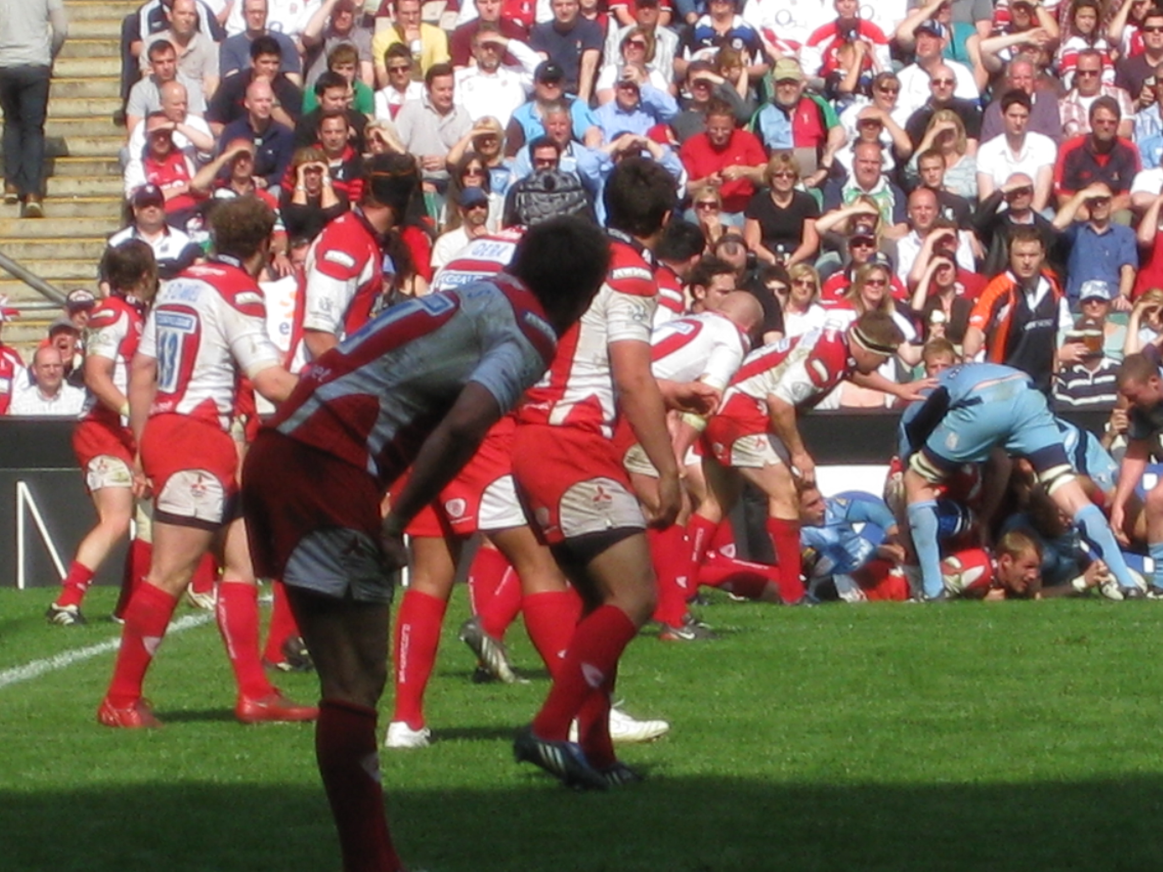 Gloucester et les Cardiff Blues en Coupe anglo-galloise en finale en avril 2009 au stade de Twickenham. Prise le 18 avril 2009. Gloucester Rugby and Cardiff Blues in final cup in Twickenham stadium. 18 April 2009.